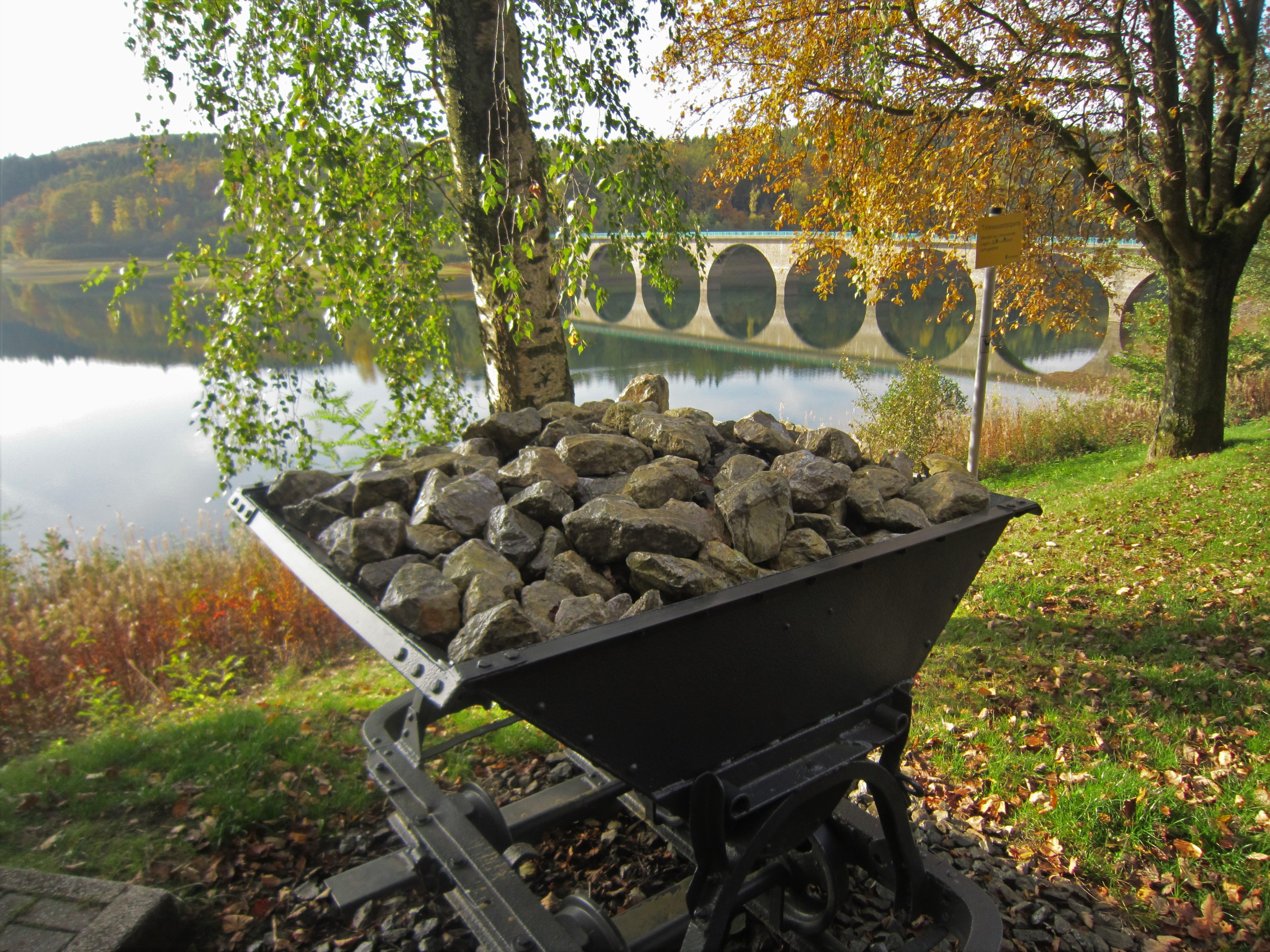 Versetalsperre im Märkischen Kreis (NRW). Im Vordergrund das Mahnmal für die Zwangsarbeiter im Zweiten Weltkrieg, im Hintergrund die Klamer Brücke.